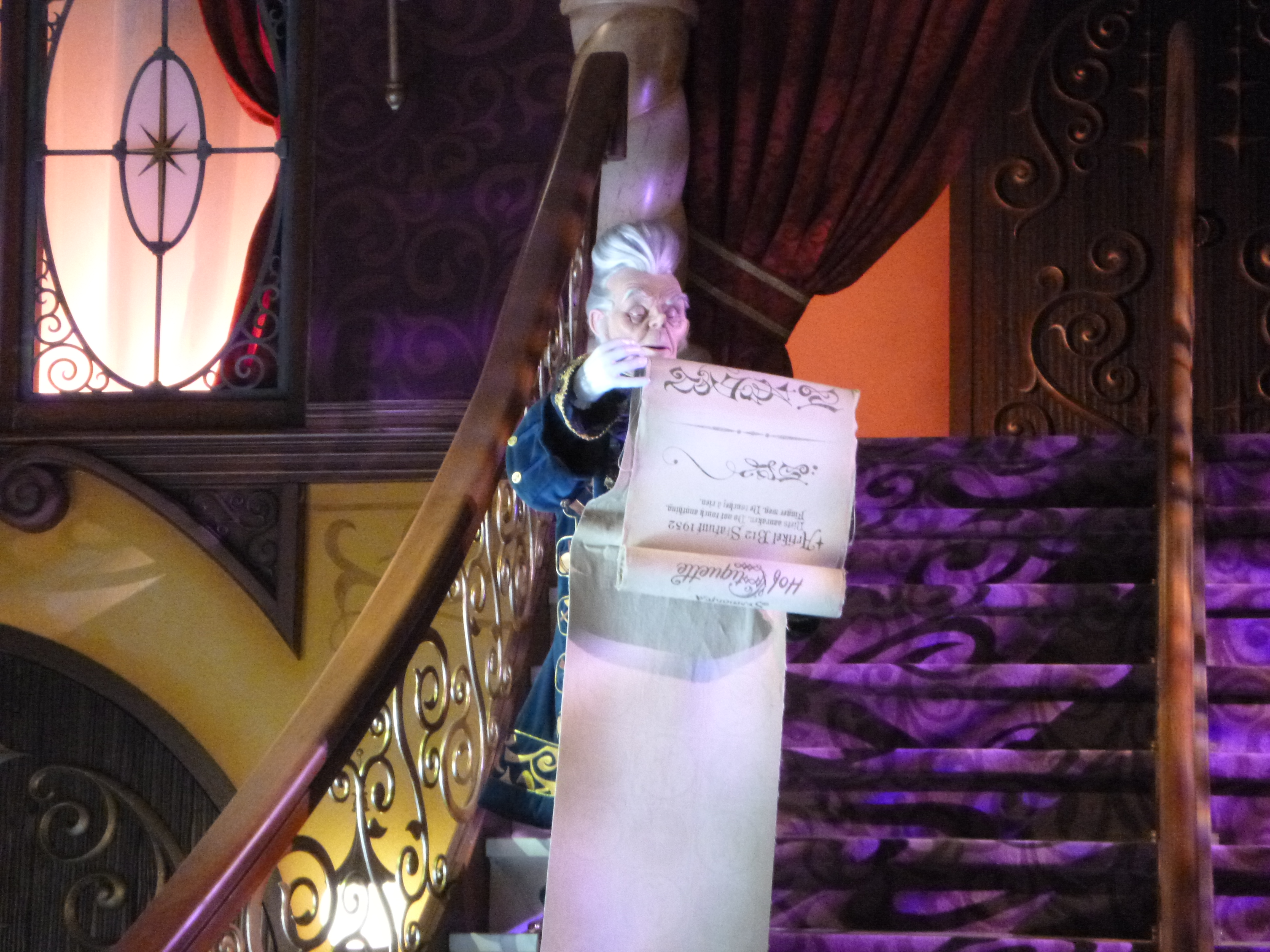 Préshow de Symbolica